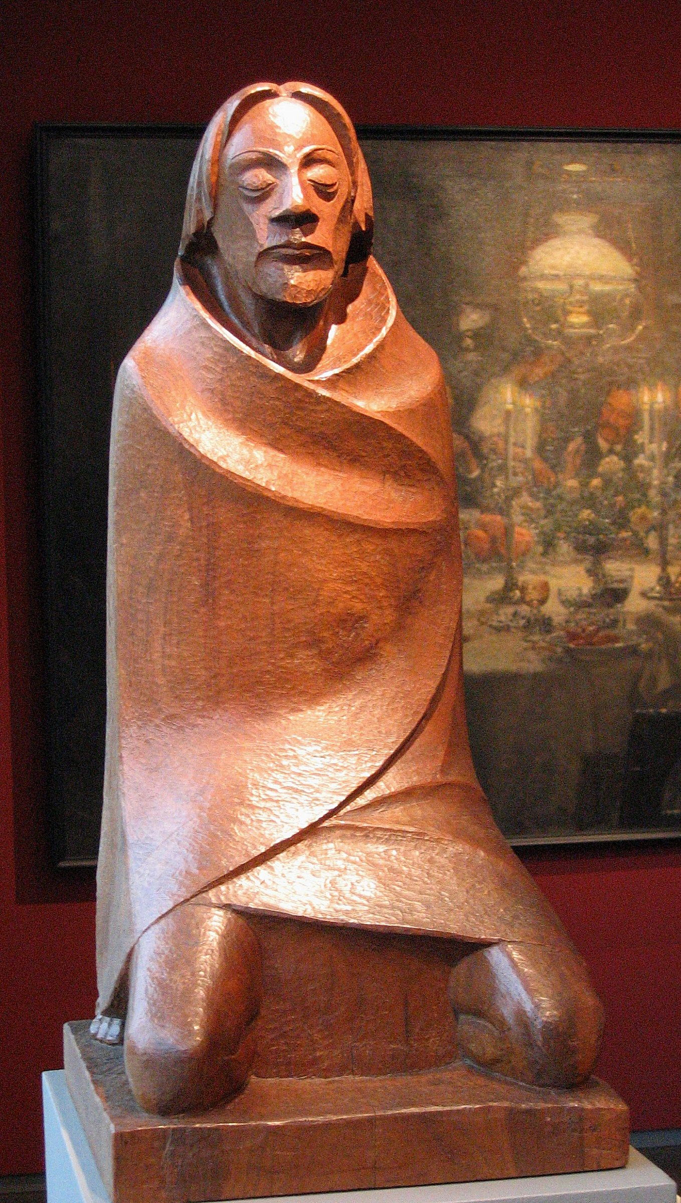 Der Asket, 1925, Nussbaum, Ernst Barlach Haus, Hamburg